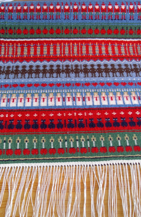 Gubbaväv eller bunden rosengång. Se även detalj här